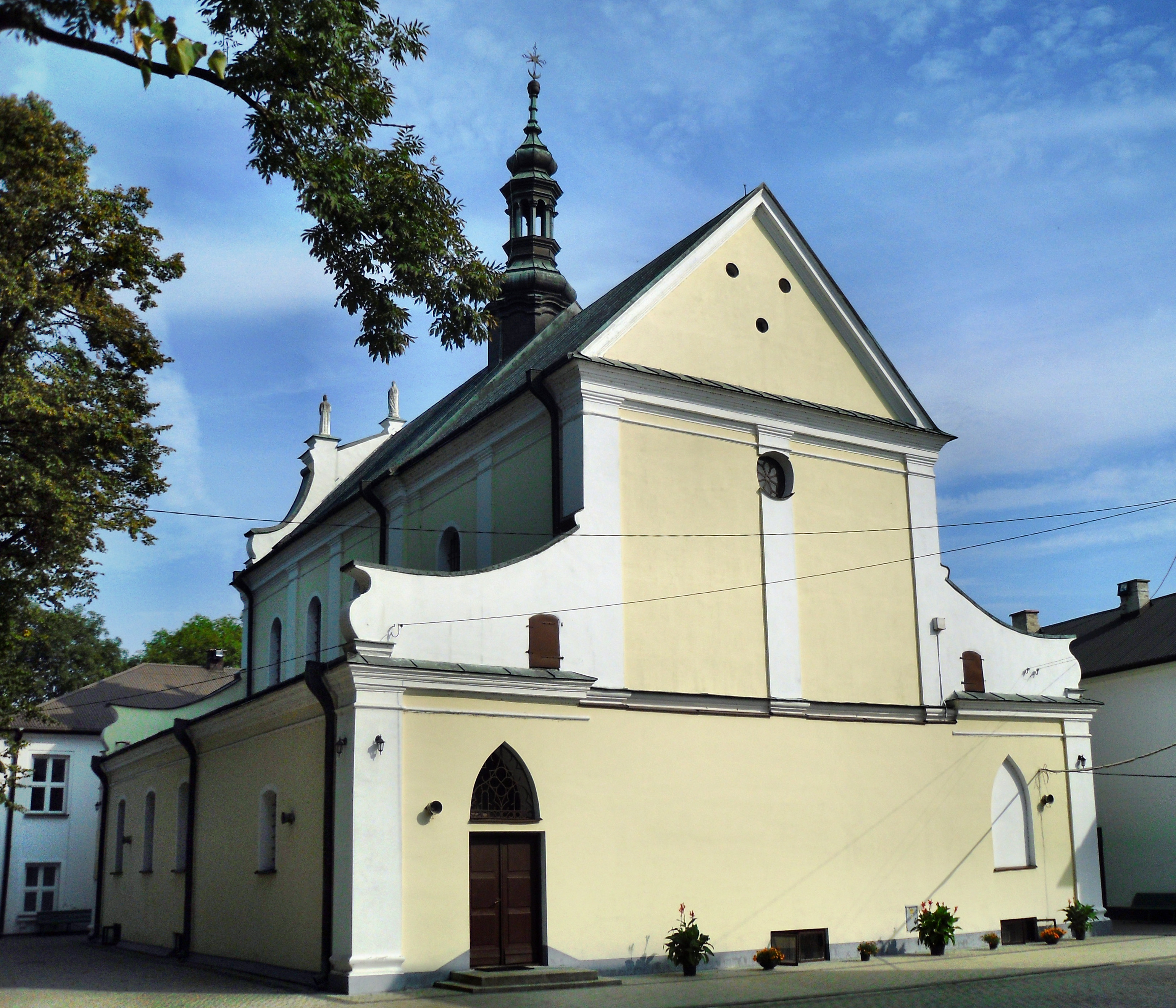 Hrubieszów - kościół parafialny w zespole klasztornym dominikanów (zabytek nr rejestr. kl -V-Oa/81/56)